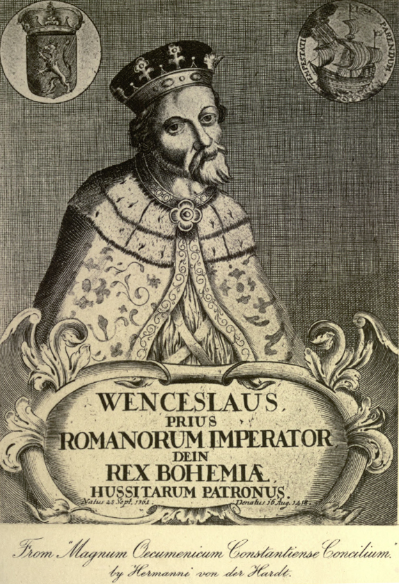 Václav IV. v době kostnického koncilu 1415 - fiktivní portrét z doby baroka